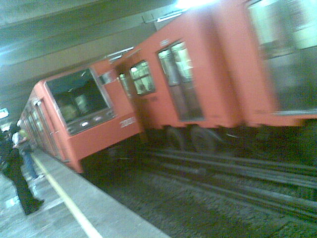 Par de NM-73 en linea 3.